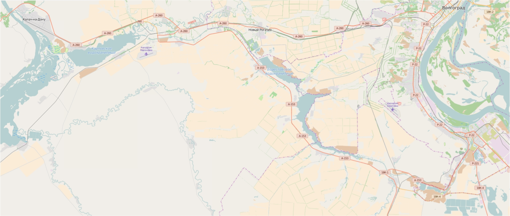 Волгодонской канал на картах Open Street Map